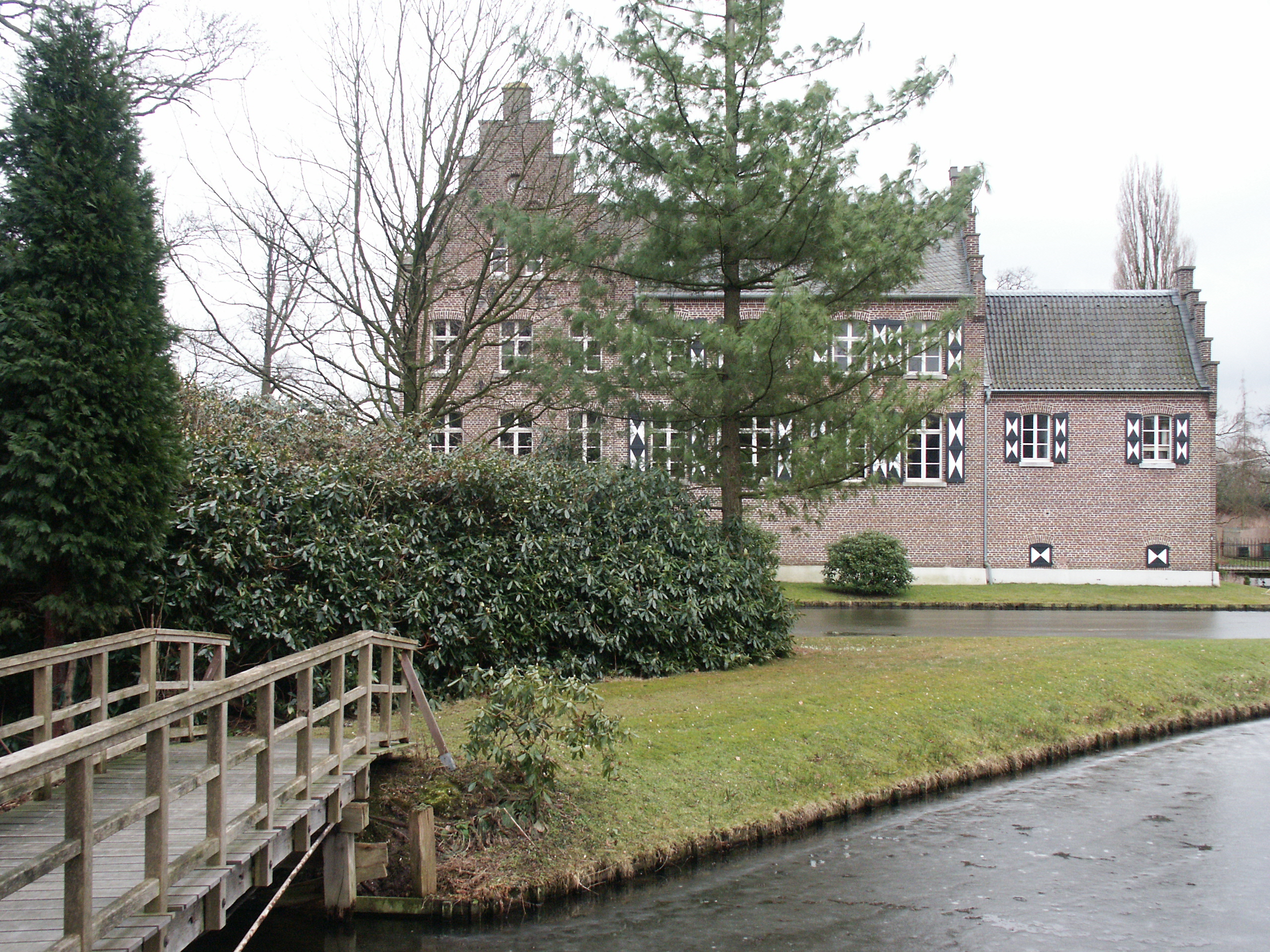 Haus Coull in Straelen, Nordseite